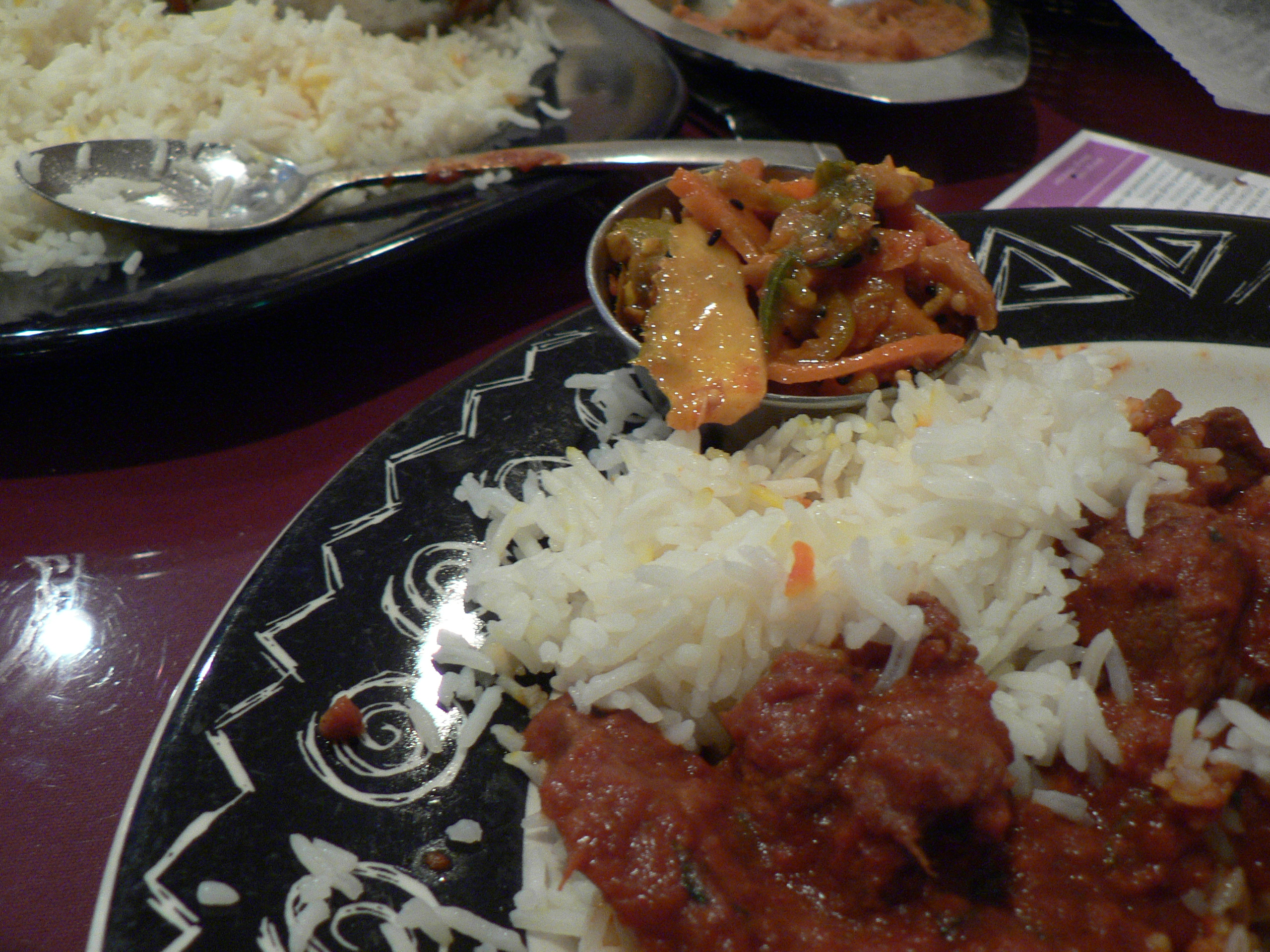 Mango chutney